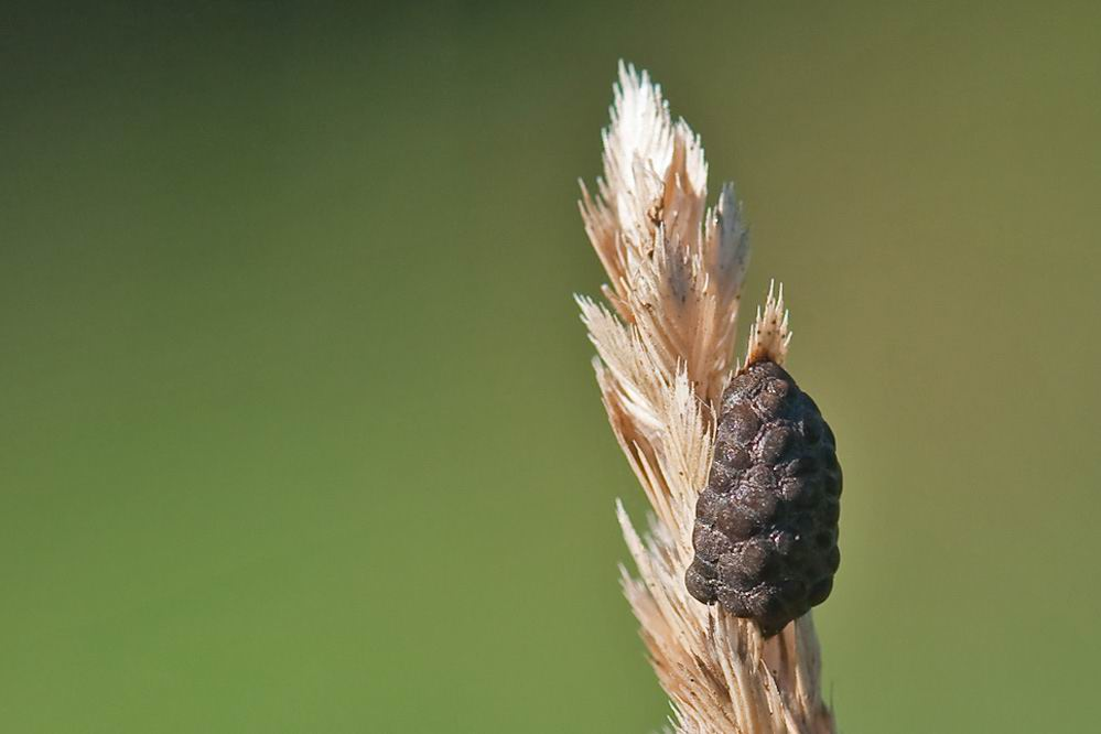 Eigelege des Rainfarn-Blattkäfers auf einem Kammgras-Blütenstand. Heuberg (Bad.-Württ.), 24.9.2011